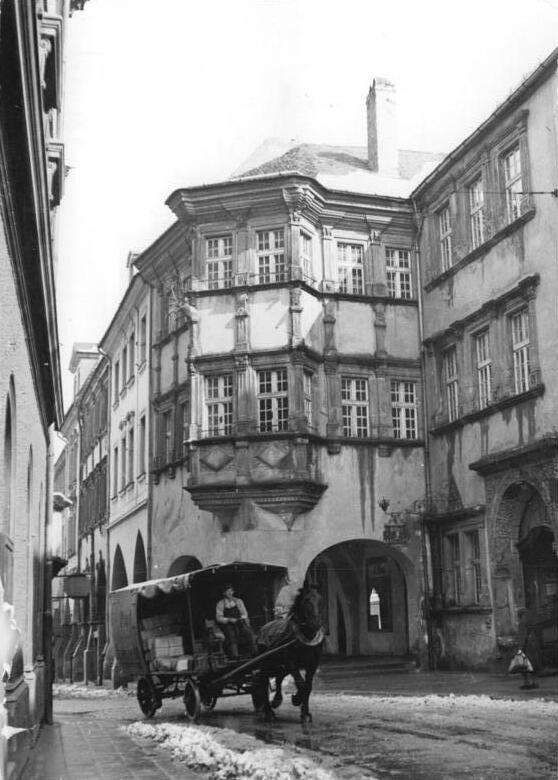 Görlitz, Schönhof, Pferdegspann Zentralbild Klein 11.5.52 Stadtbilder aus Görlitz. Durch die Unterstützung unserer Regierung werden die alten Kulturbauten der Stadt Görlitz erhalten und instandgesetzt. UBz: Der "Schönhof", ein Gebäude der frühesten deutschen Renaissance, ist einer der schönsten deutschen Kulturbauten. Der Stadtbaumeister Wendel-Roskopf errichtete dieses Gebäude im Jahre 1526.